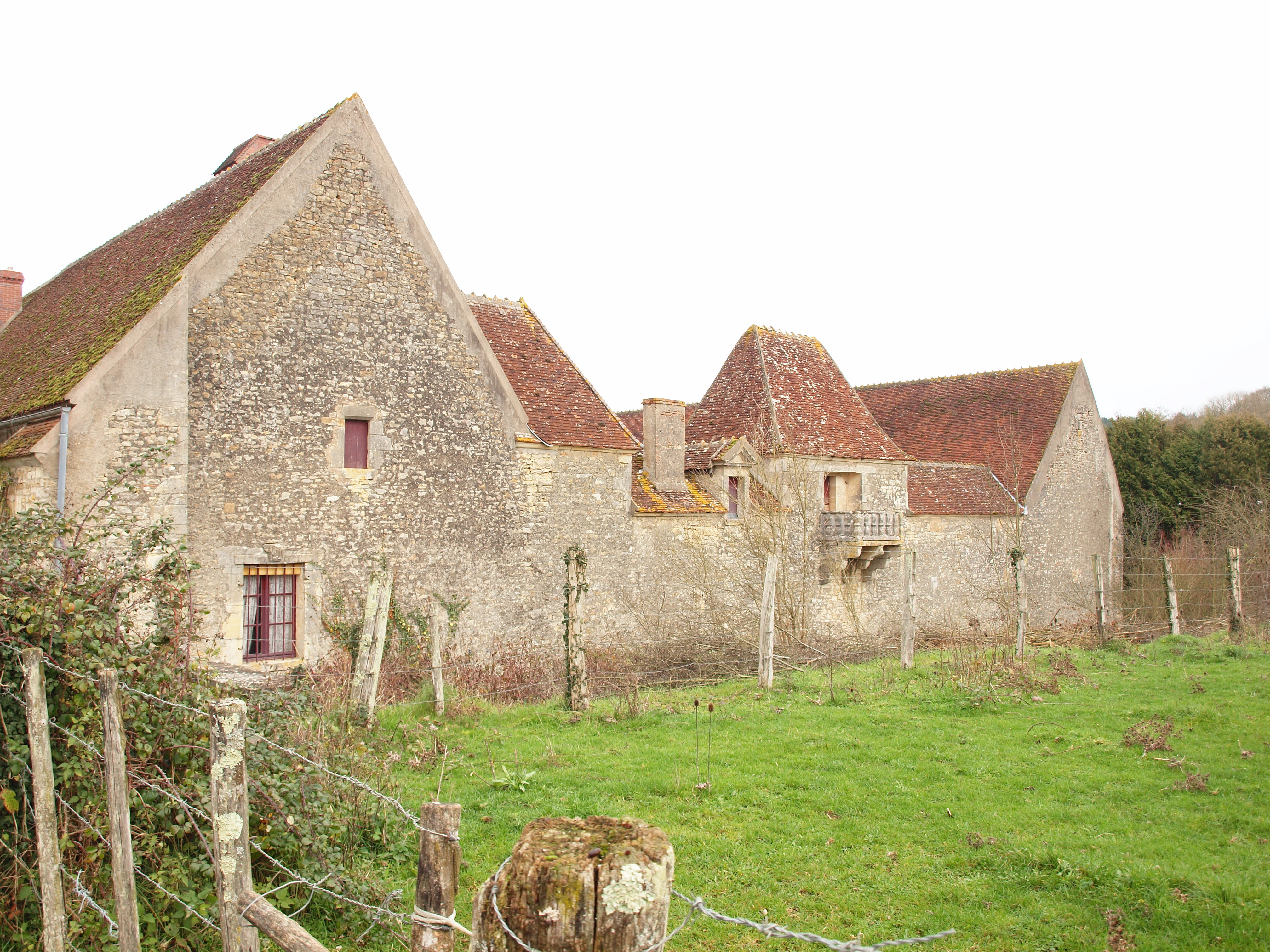 Corvol-l'Orgueilleux (Nièvre, France) ; Sauzay : ferme fortifiée